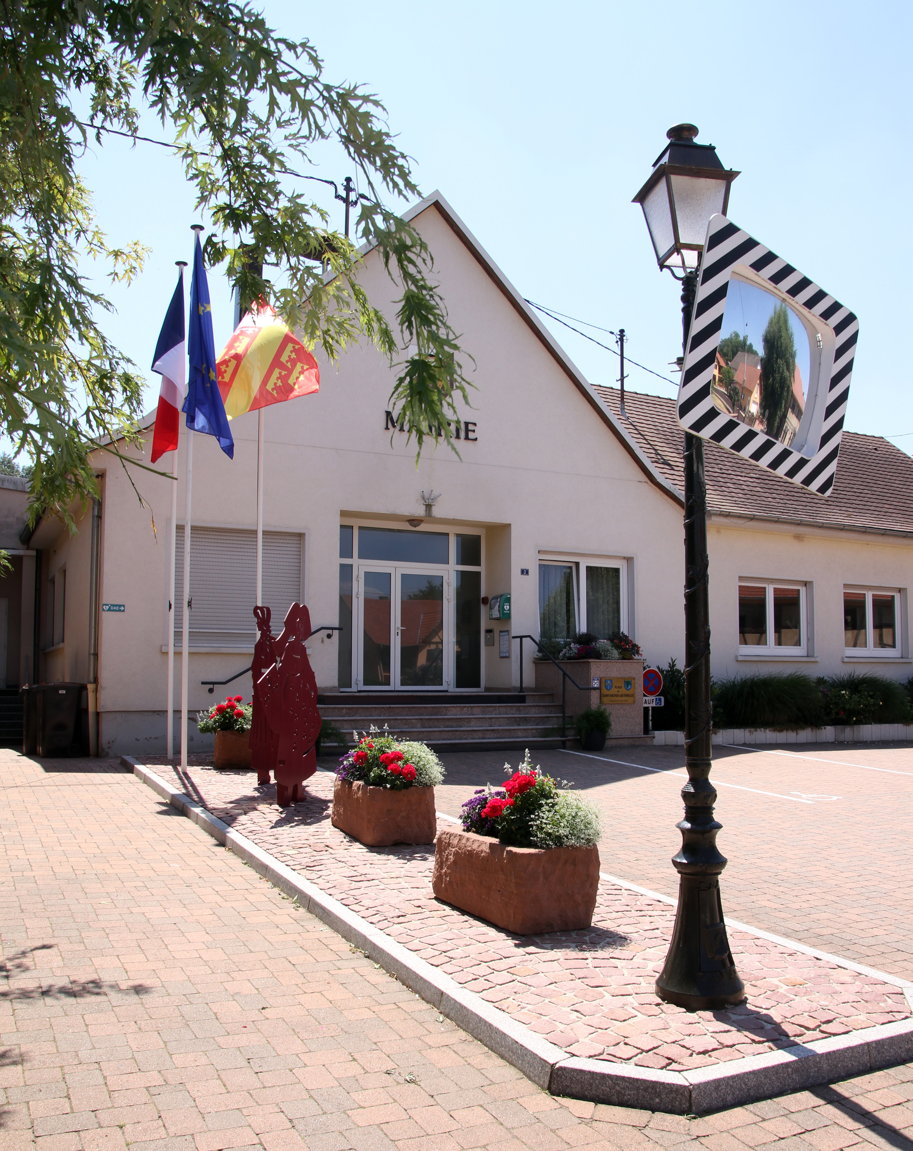 Neewiller bei Lauterbourg